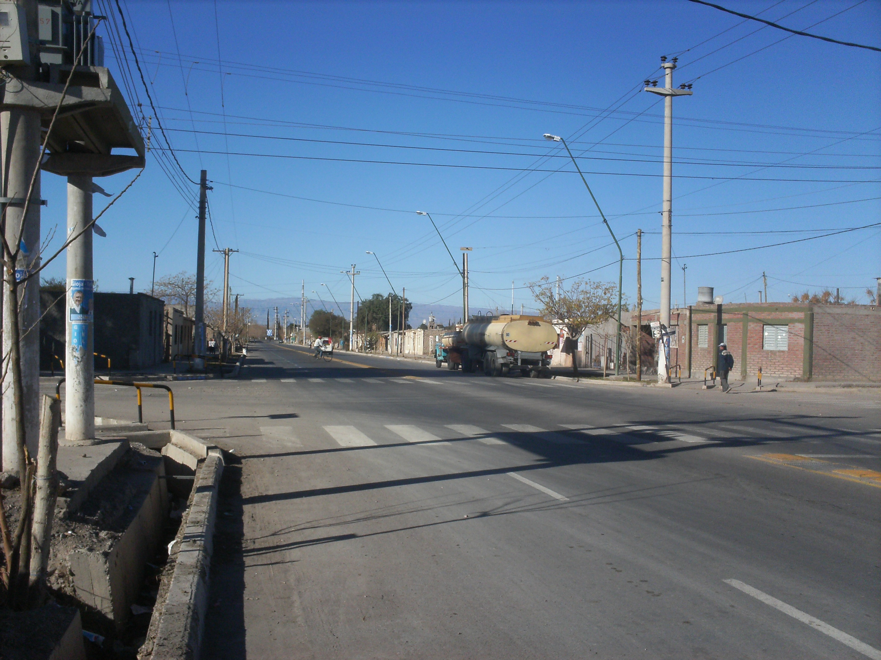 Calle Rodriguez en las inmediaciones de Villa Paula Albarracín de Sarmiento, departamento Chimbas, provincia de San Juan, Argentina